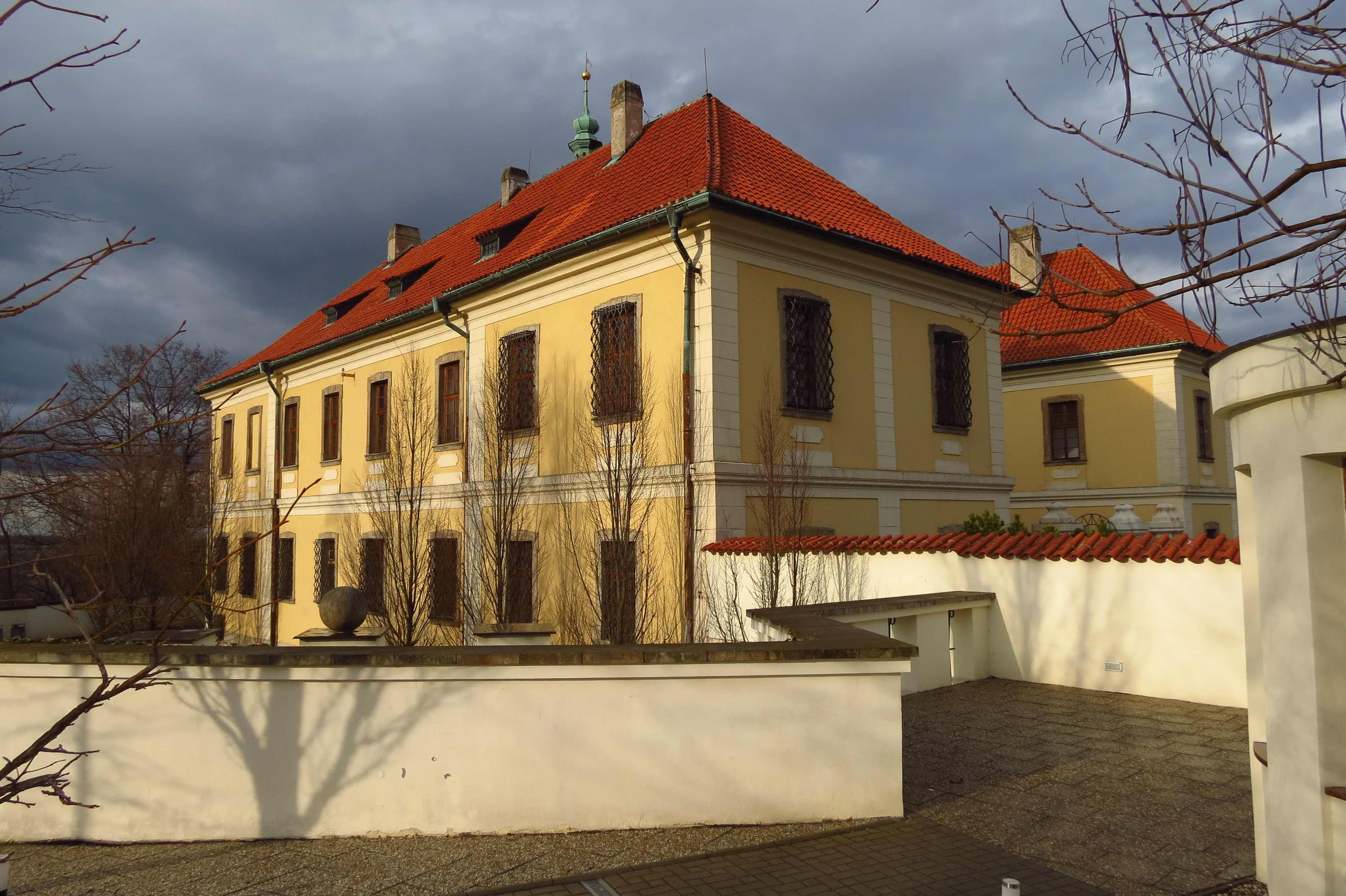 Kladno, barokní zámek z pol. 18. stol. od vchodu do zahrady (jihozápadní nároží zámku), vlevo je zeď nad bývalým příkopem.